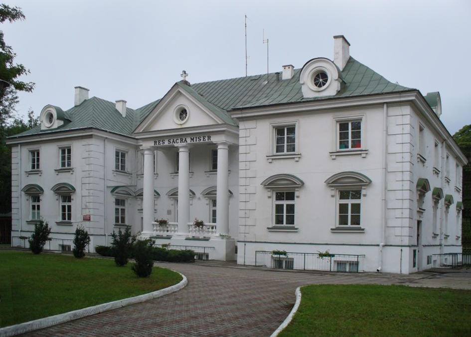 Pałac w Gościeradowie. Należał do Prażmowskich, a następnie Suchodolskich. Obecnie znajduje się w nim Dom Pomocy Społecznej im. hr. Eligiusza Suchodolskiego.